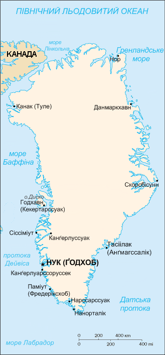 Мапа Ґренландії.